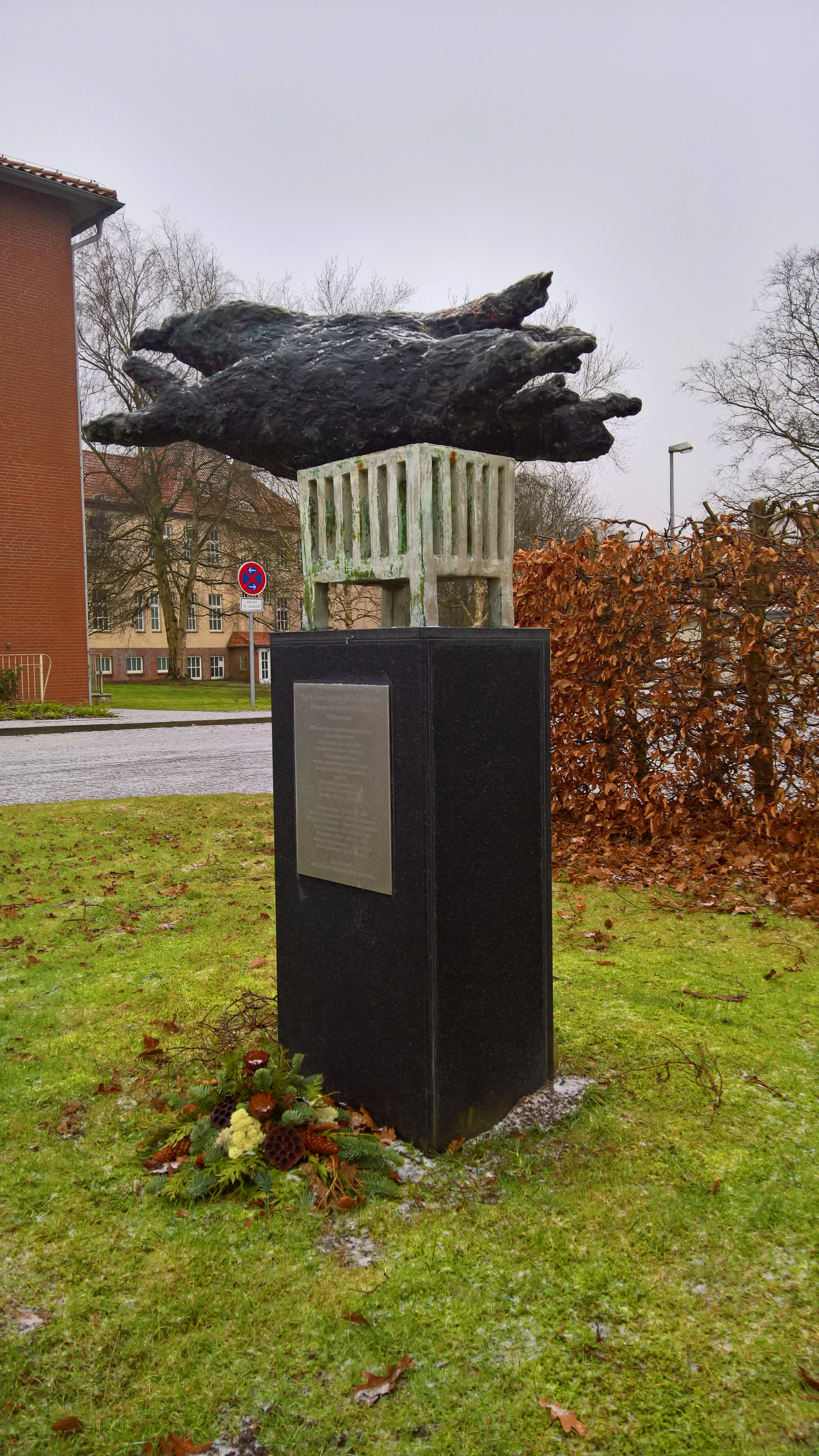 Otterndorf- Am 8. Mai 2009 wurde ein Messing-Mahnmal mit den Namen der toten Zwangsarbeiterkinder eingeweiht: eine Skulptur der Künstlerin Rachel Kohn - eine dunkle Wolke über einem Kinderbett und darunter die Platte mit den 14 Namen. „Mit der Erinnerung an das Schicksal der 14 Kinder können wir hoffentlich den kritischen Geist in den Kindern und Jugendlichen von heute wecken.“